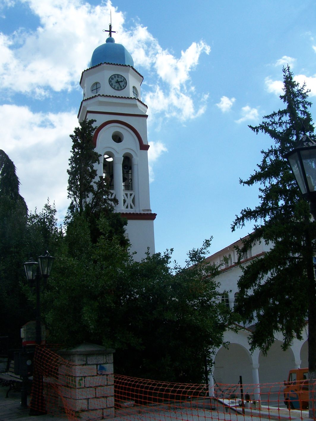 Die Kirche in Polygyros